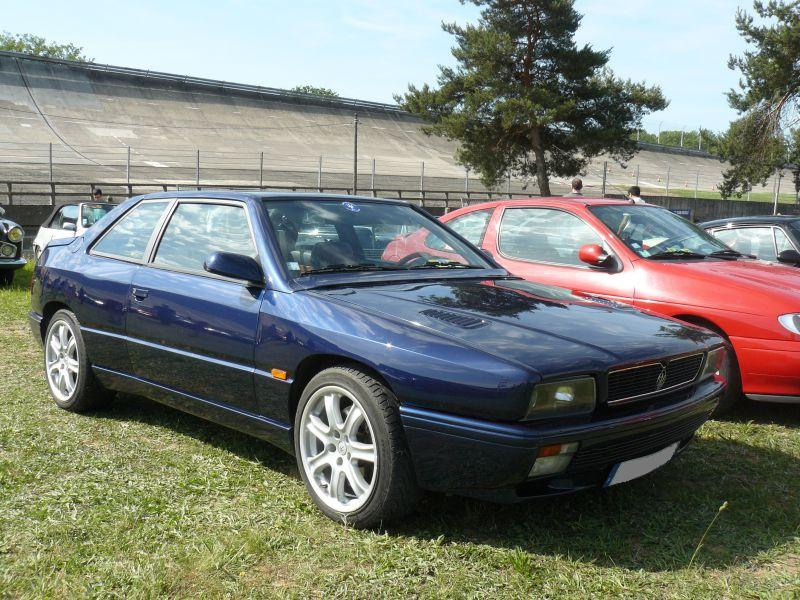 Montlhery2012